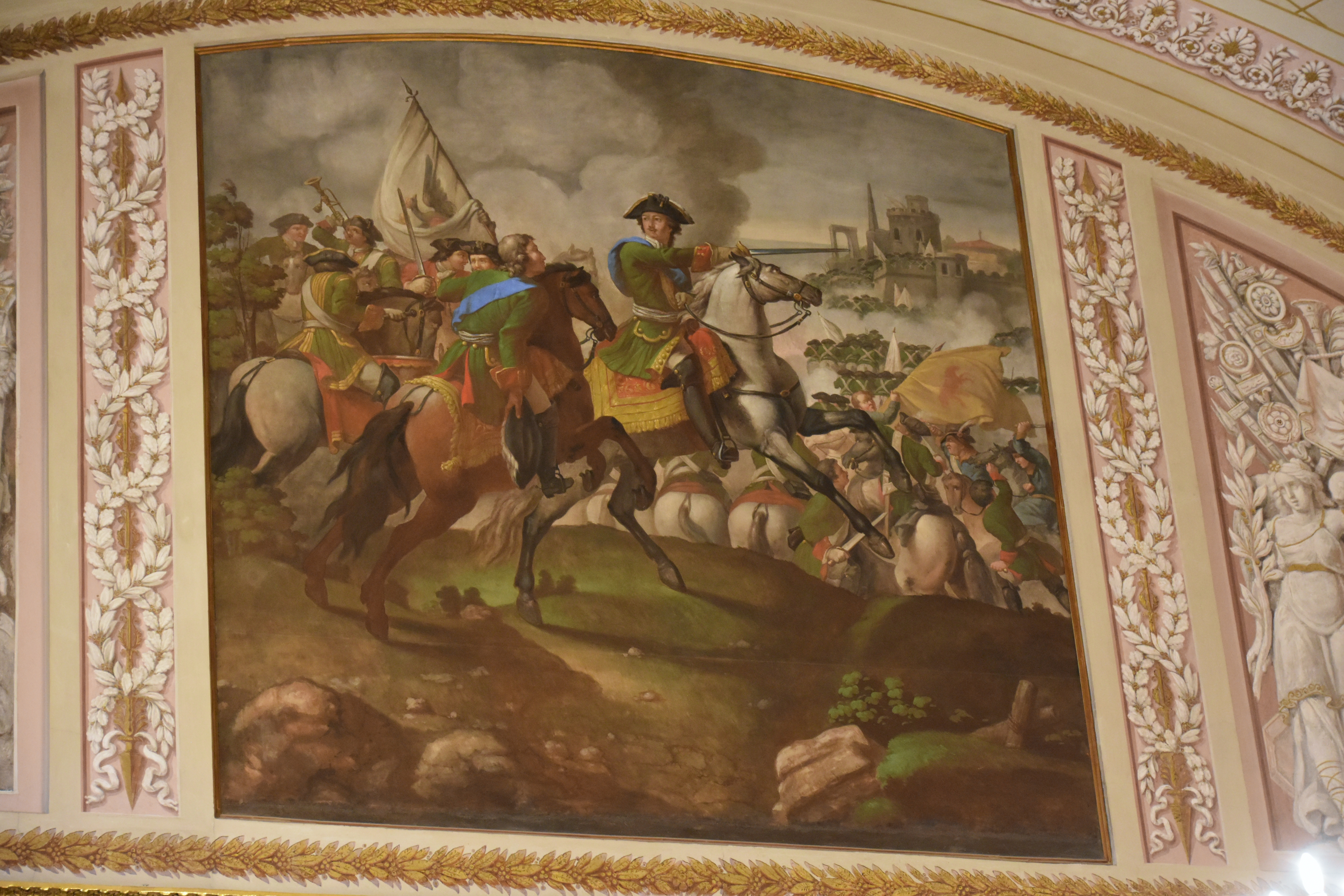 Hermitage Museum, St. Petersburg (74)